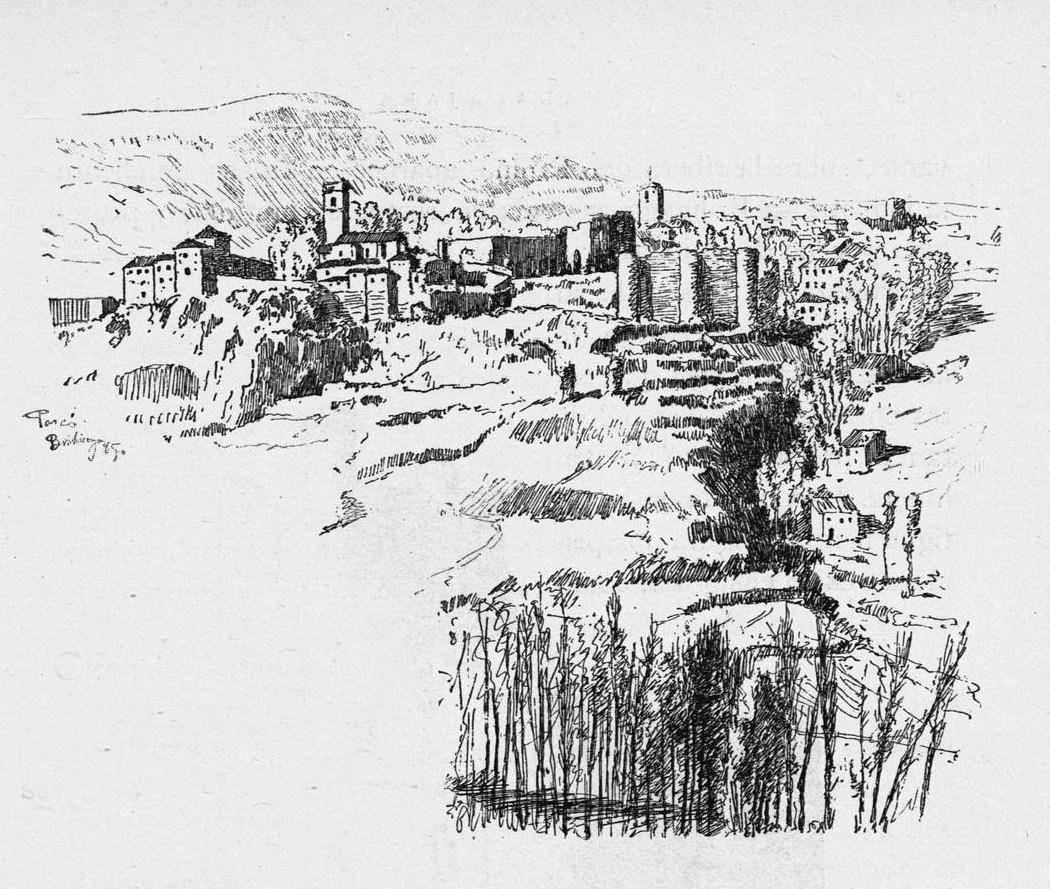 Brihuega.